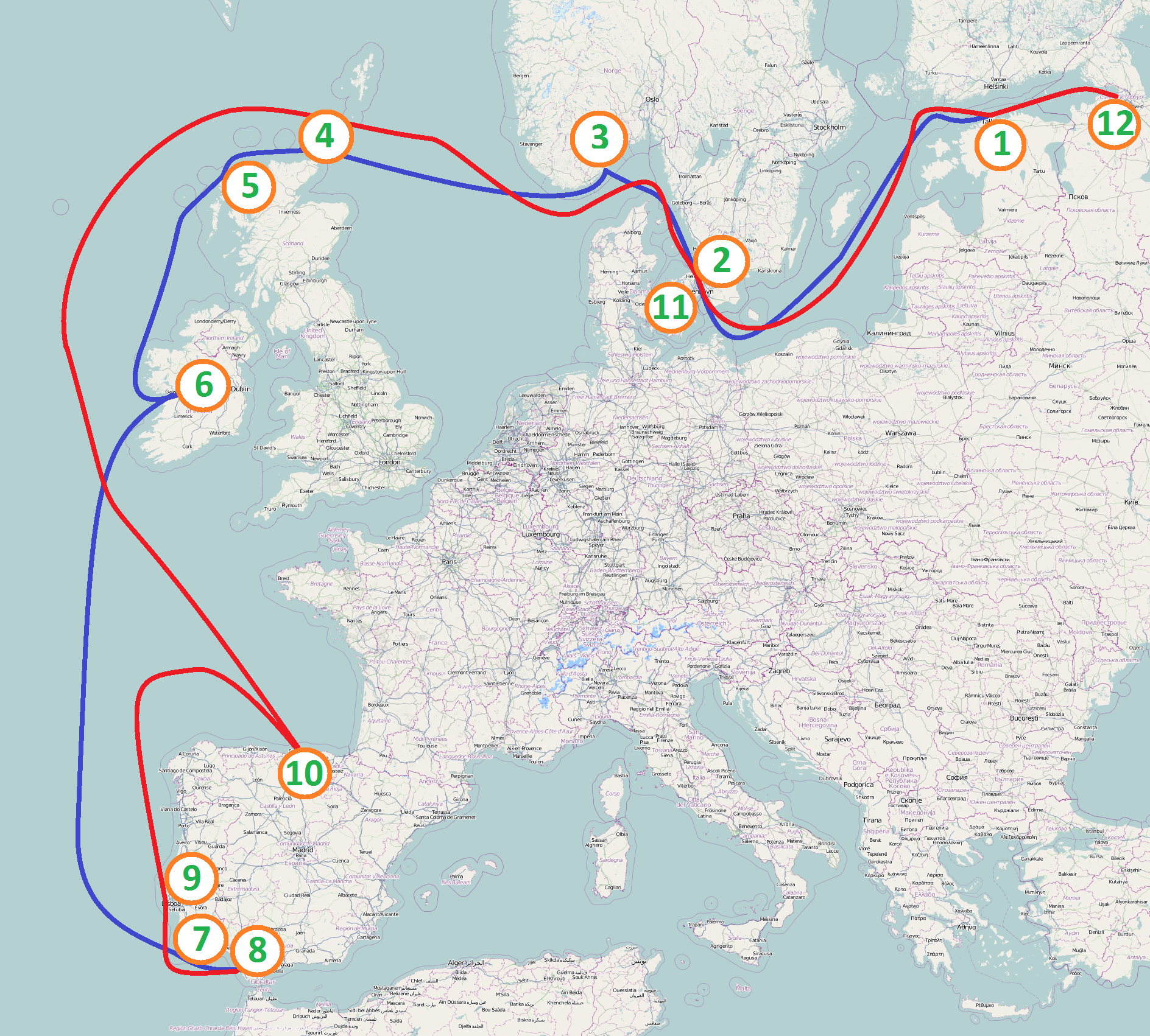 Маршрут Русской океанской экспедиции в Испанию (1725—1726). Обозначенные точки: 1 - г. Ревель, 2 - г. Эльсинор, 3 - о. Tromsya возле г. Арендал, 4 - о. Барро (Оркнейские острова), 5 - о. Льюис (Внешние Гебридские острова), 6 - устье р. Лимерик, 7 - мыс Сан Висенте, 8 - г. Кадис, 9 - г. Лиссабон, 10 - г. Сантандер, 11 - г. Копенгаген, 12 - г. Кронштадт. This map may be incomplete, and may contain errors. Don't rely solely on it for navigation.